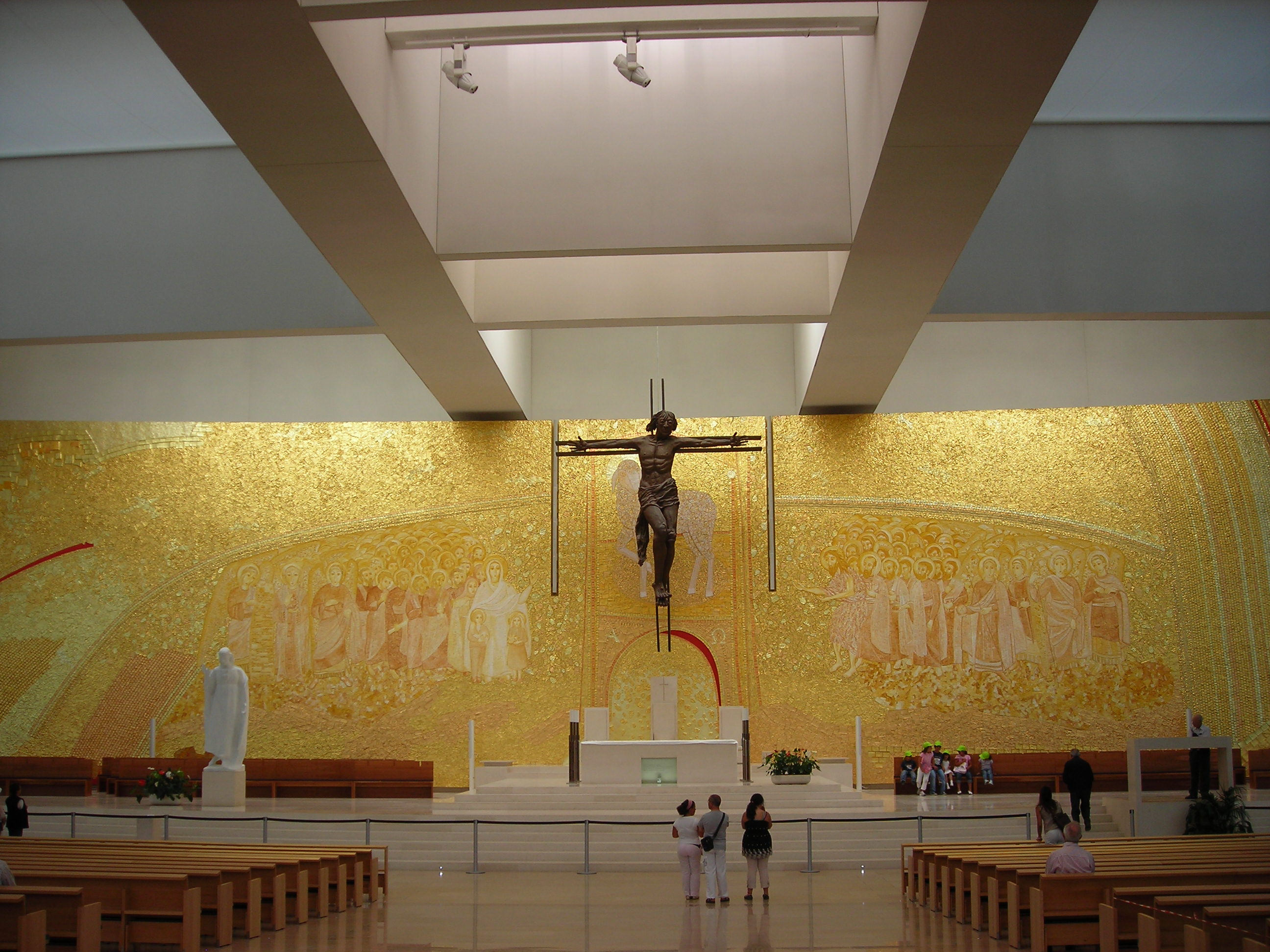 Santuário de Fátima